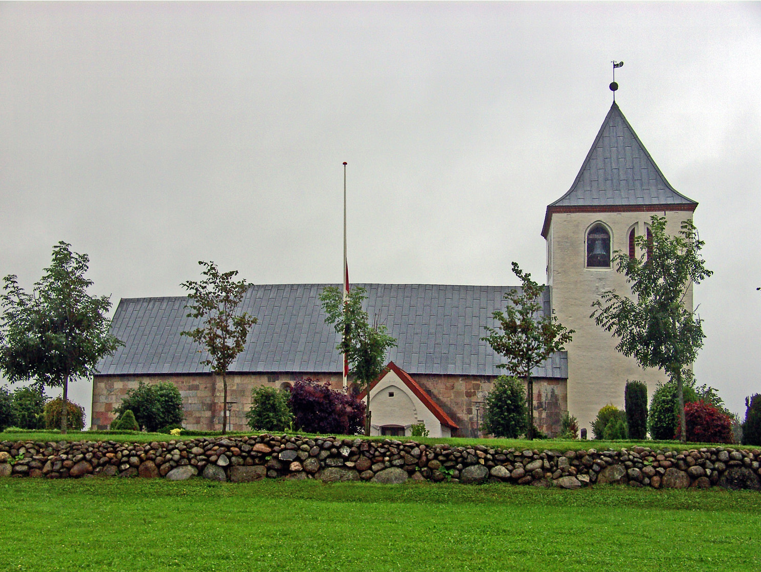 fra nord